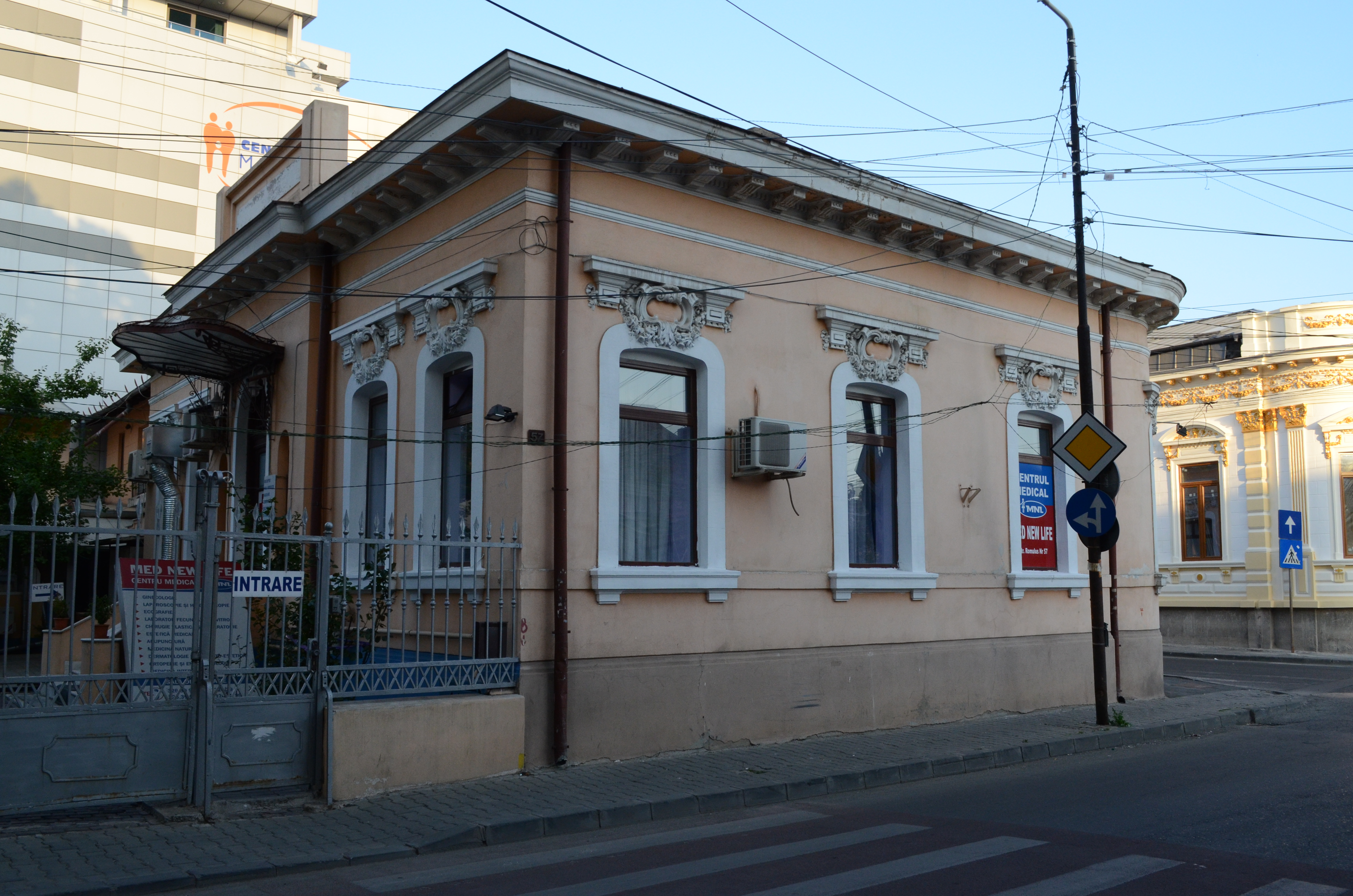 Casă, Strada Romulus nr. 57, Sector 3, București